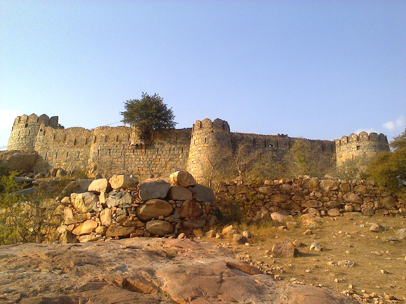 దక్షిణం నుంచి కోట